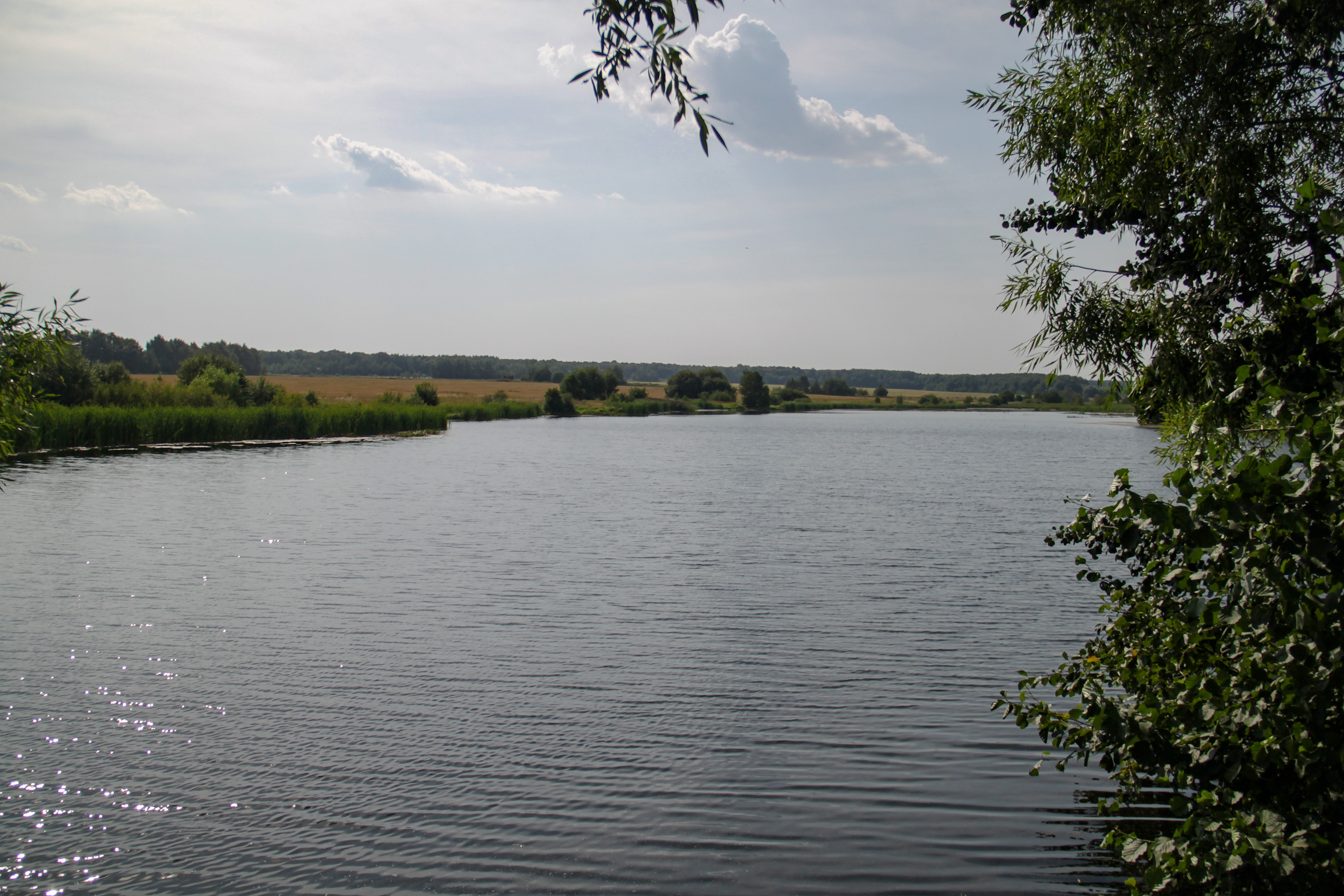 Ильинский пруд, река Клещевая, Рыбновский район, Рязанская область, Россия